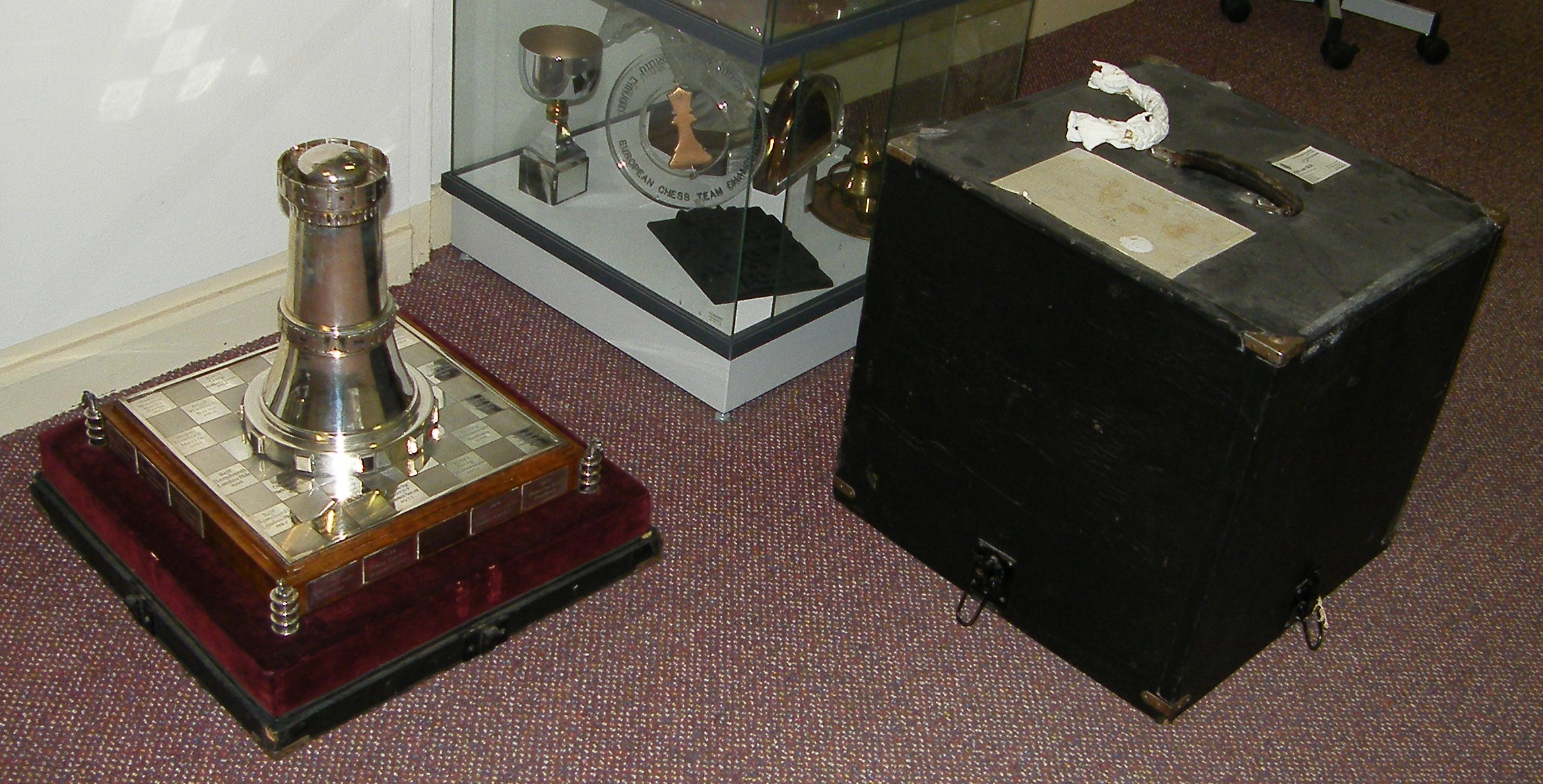 Pokal "Silberner Turm" bzw. Dähne-Pokal in der Geschäftsstelle des Deutschen Schachbundes